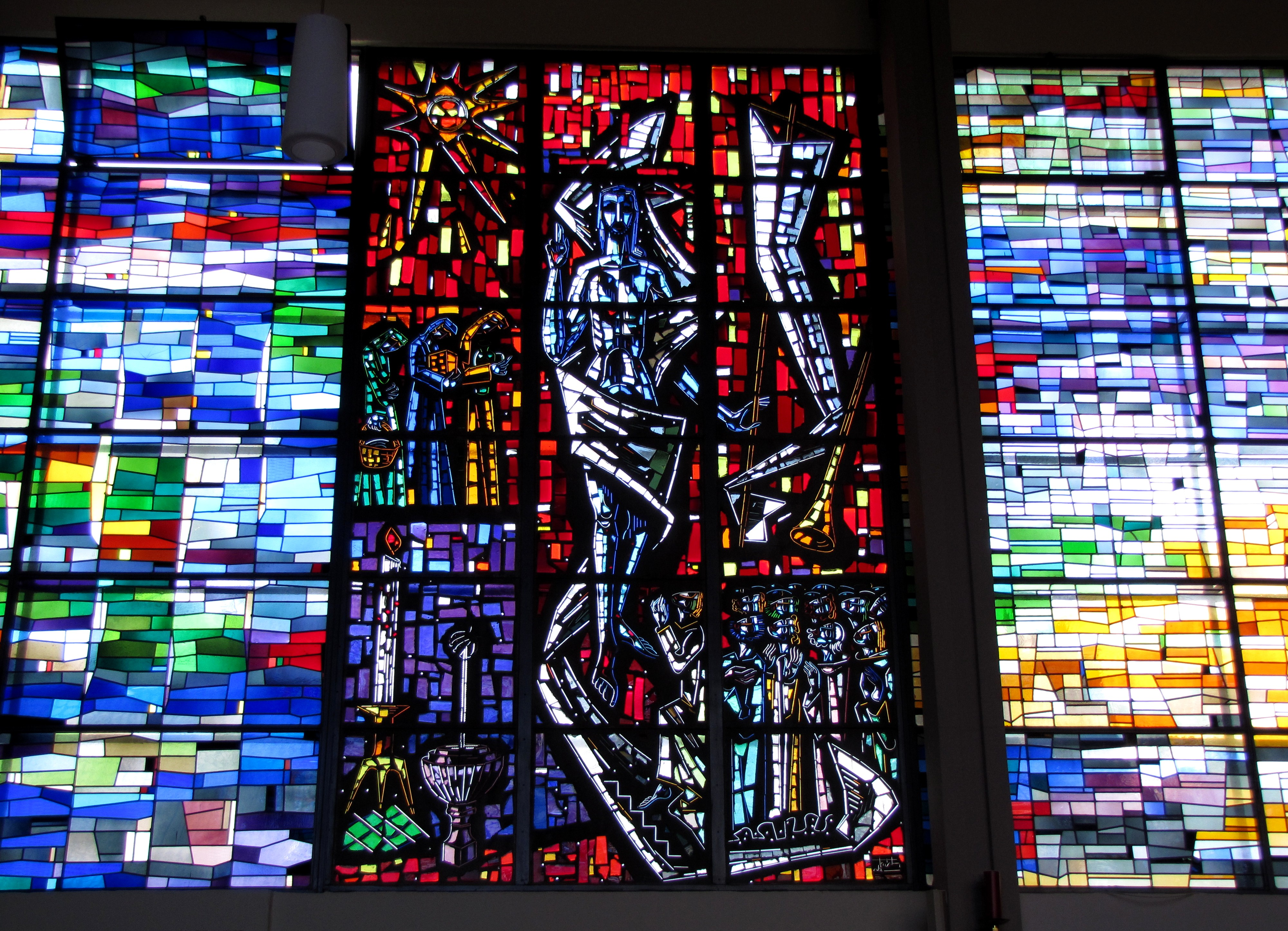 Alsace, Bas-Rhin, Truchtersheim, Église Saints-Pierre-et-Paul (IA67000997): Verrières de la nef (Tristan Ruhlmann, XXe).